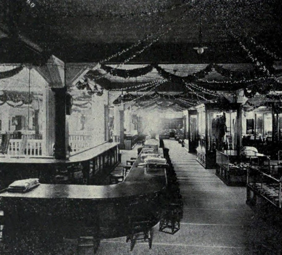 三越百貨店のカウンター